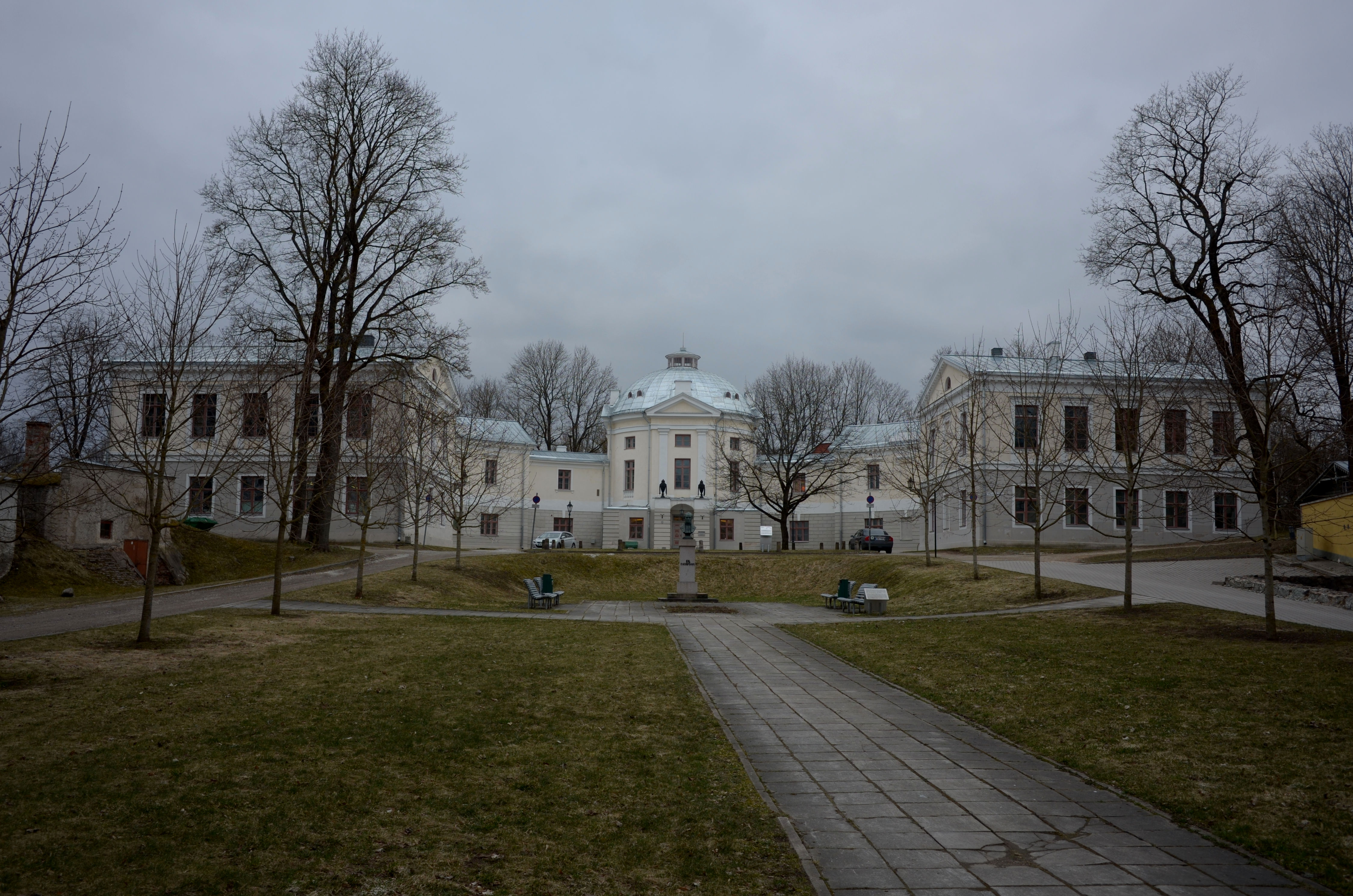 Tartu Vana Anatoomikum 2019. aastal